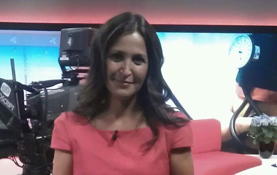 Katia Elliott i Gomorron Sverige